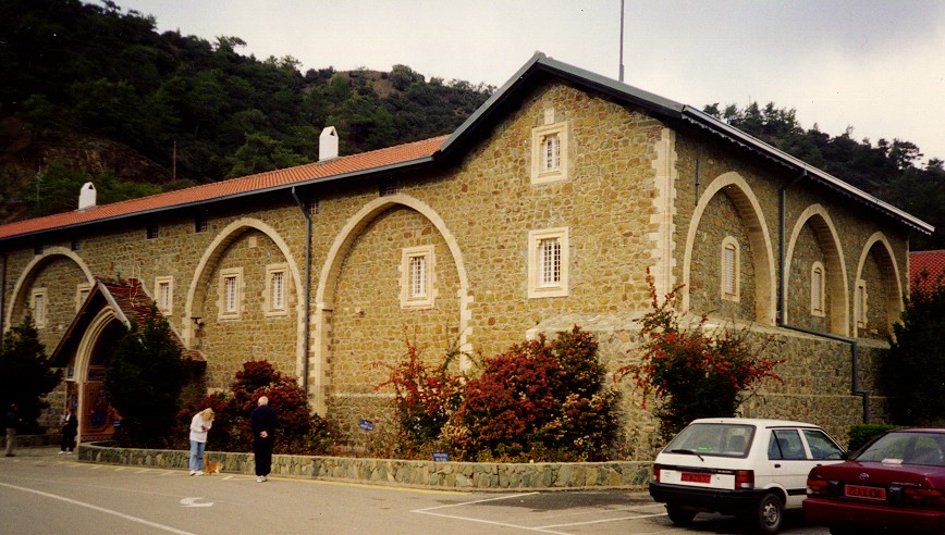 Monasterio de Kikkos. Ingreso a la Iglesia. Troodos. Chipre. Imagen tomada por el cargador. Año 1998.